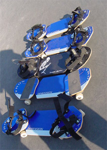 Hecha personalmente, puede ser usada de forma libre.